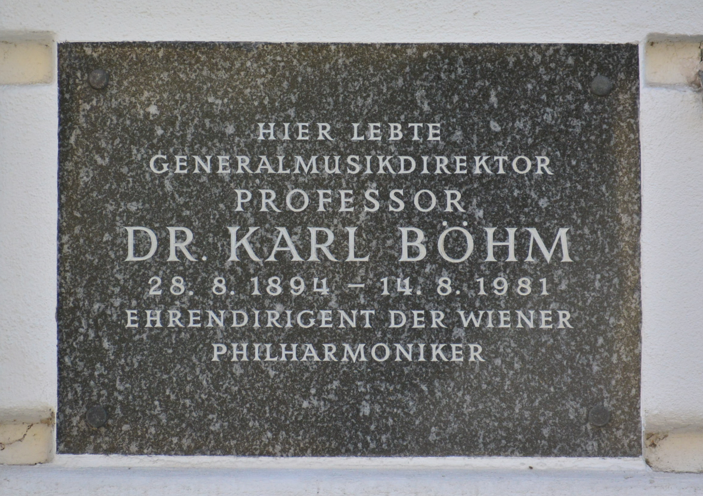 Gedenktafel für Karl Böhm (Wien, Himmelstraße 43)